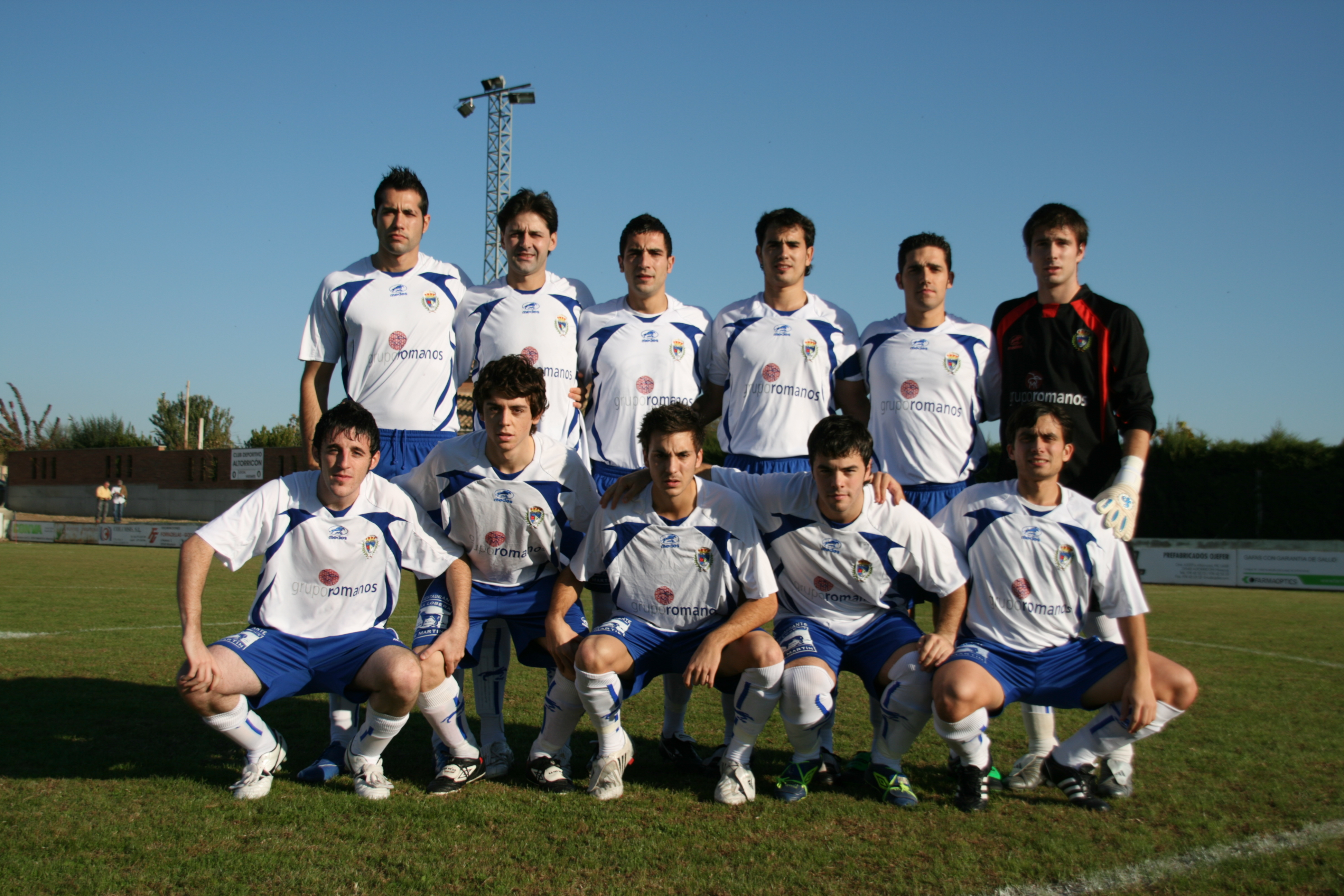 Altorricón 3 - Santa Isabel 0 (26/10/2008)